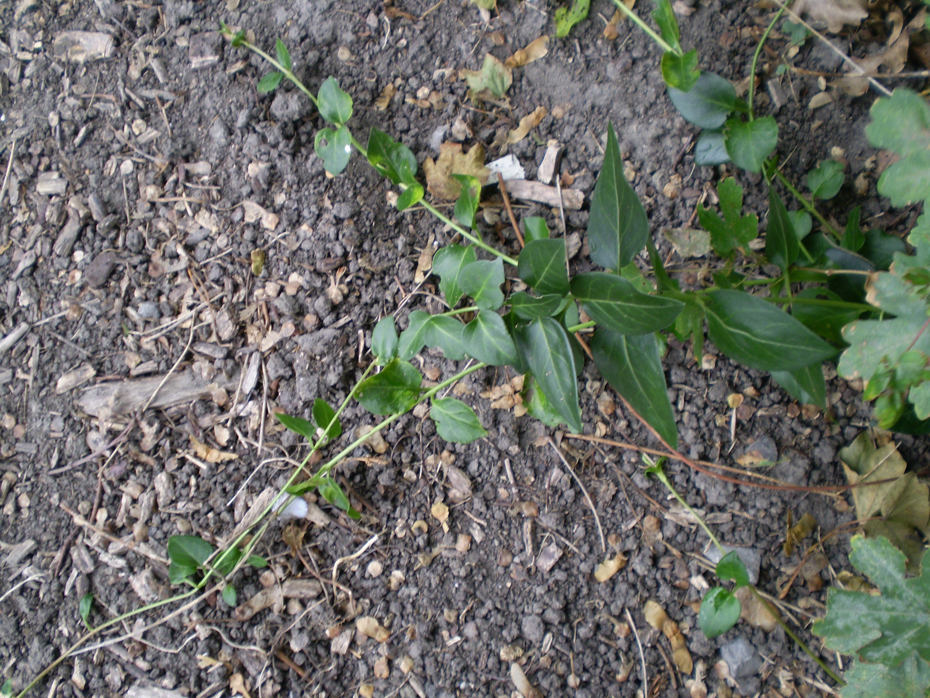 vinca major grote maagdenpalm